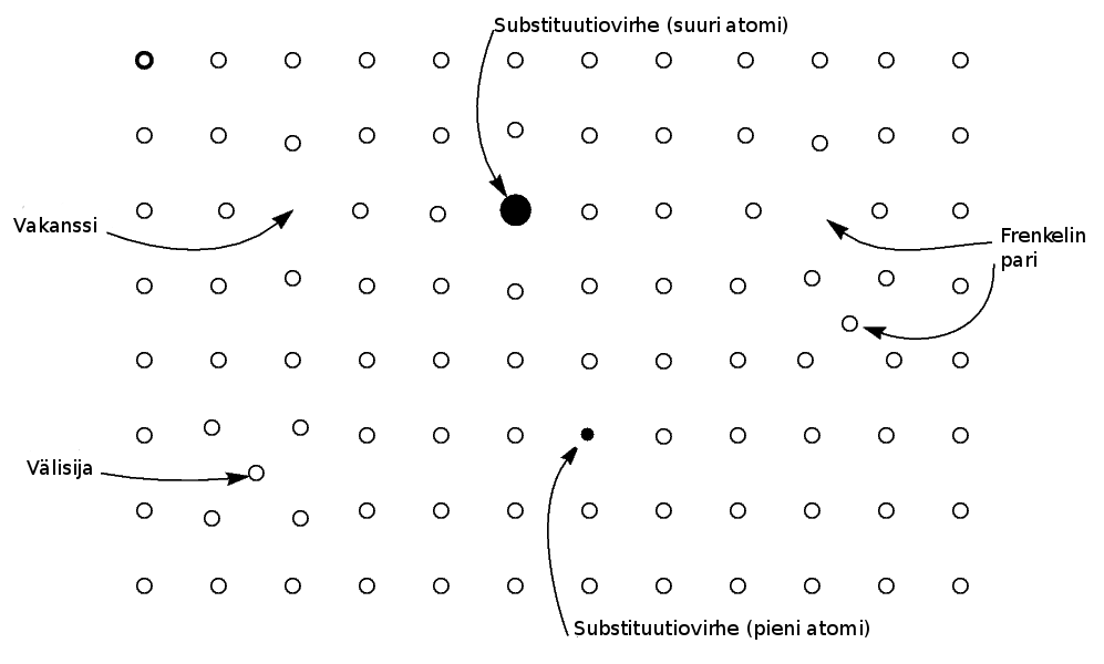 Kuvaus kidevirheistä. Alunperin omasta gradustani vuodelta 1993, suomennettu 2012